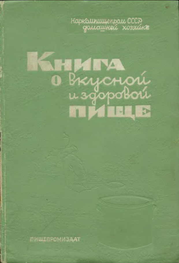 Книга о вкусной и здоровой пище